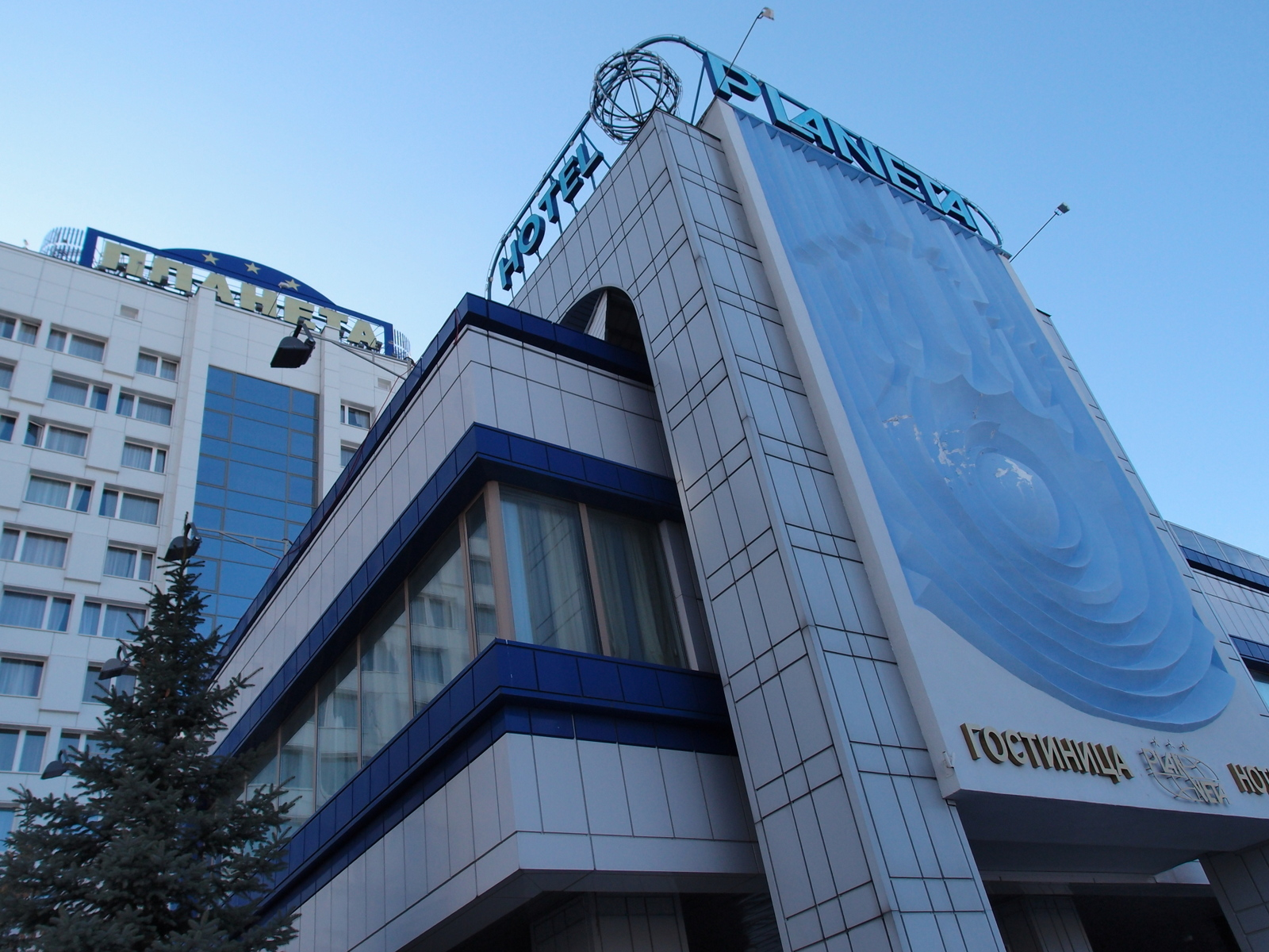 Planeta Hotel